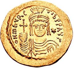 See File:Solidus-Maurice Tiberius-sb0481.jpg.